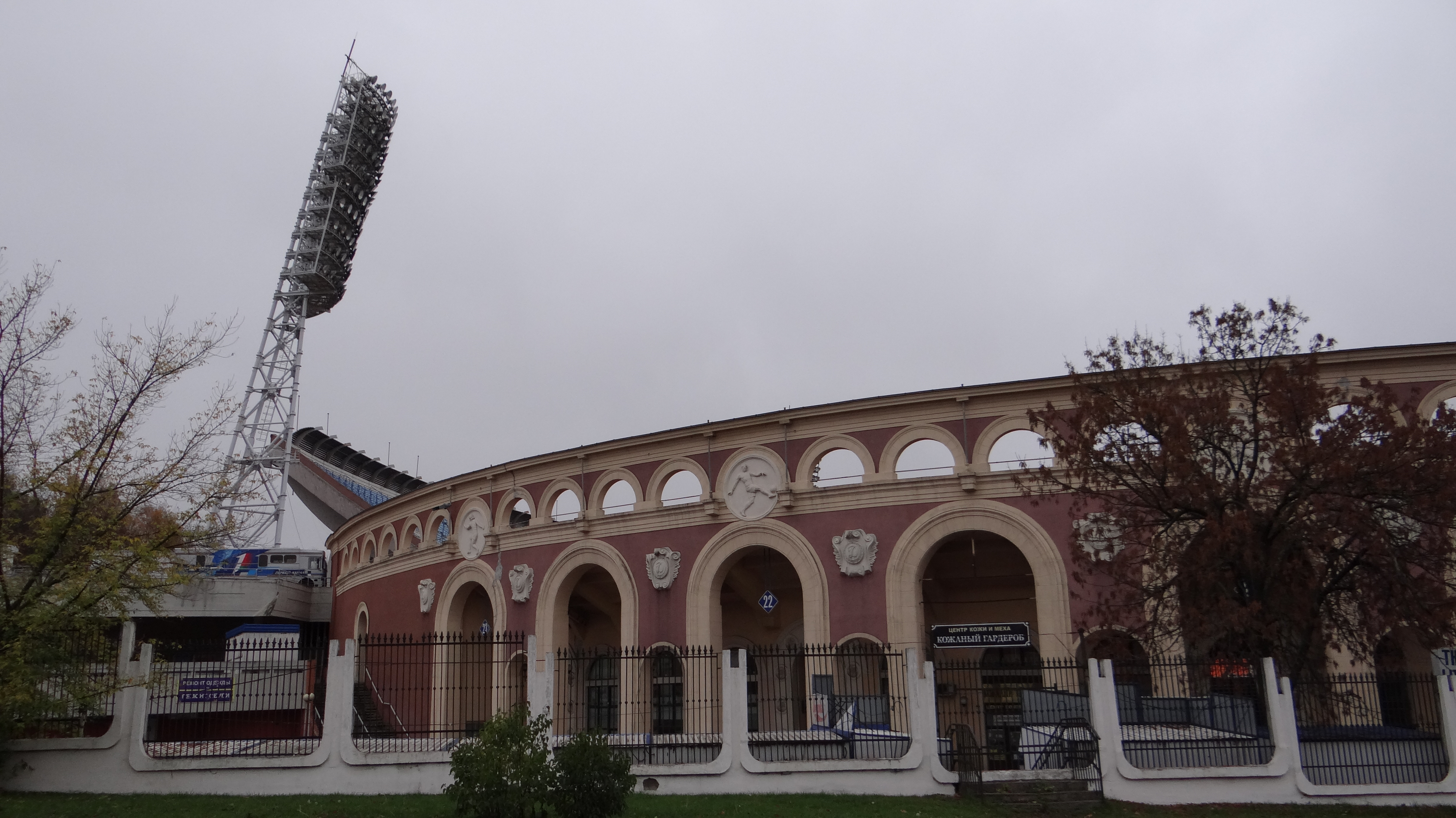 Minsk, Belarus